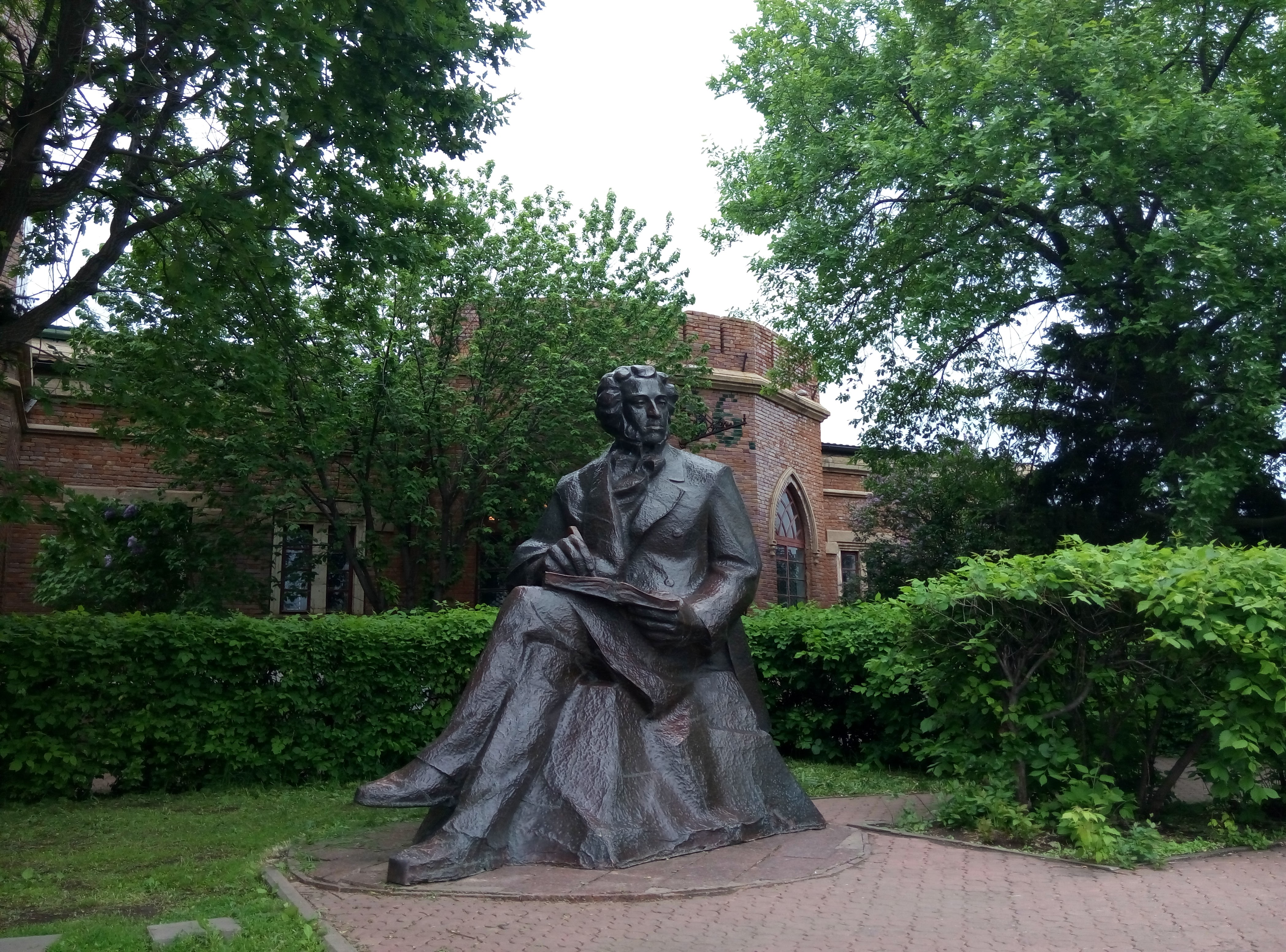 Памятник Пушкину А.С.: улица Набережная (сквер), Оренбург, Оренбургская область